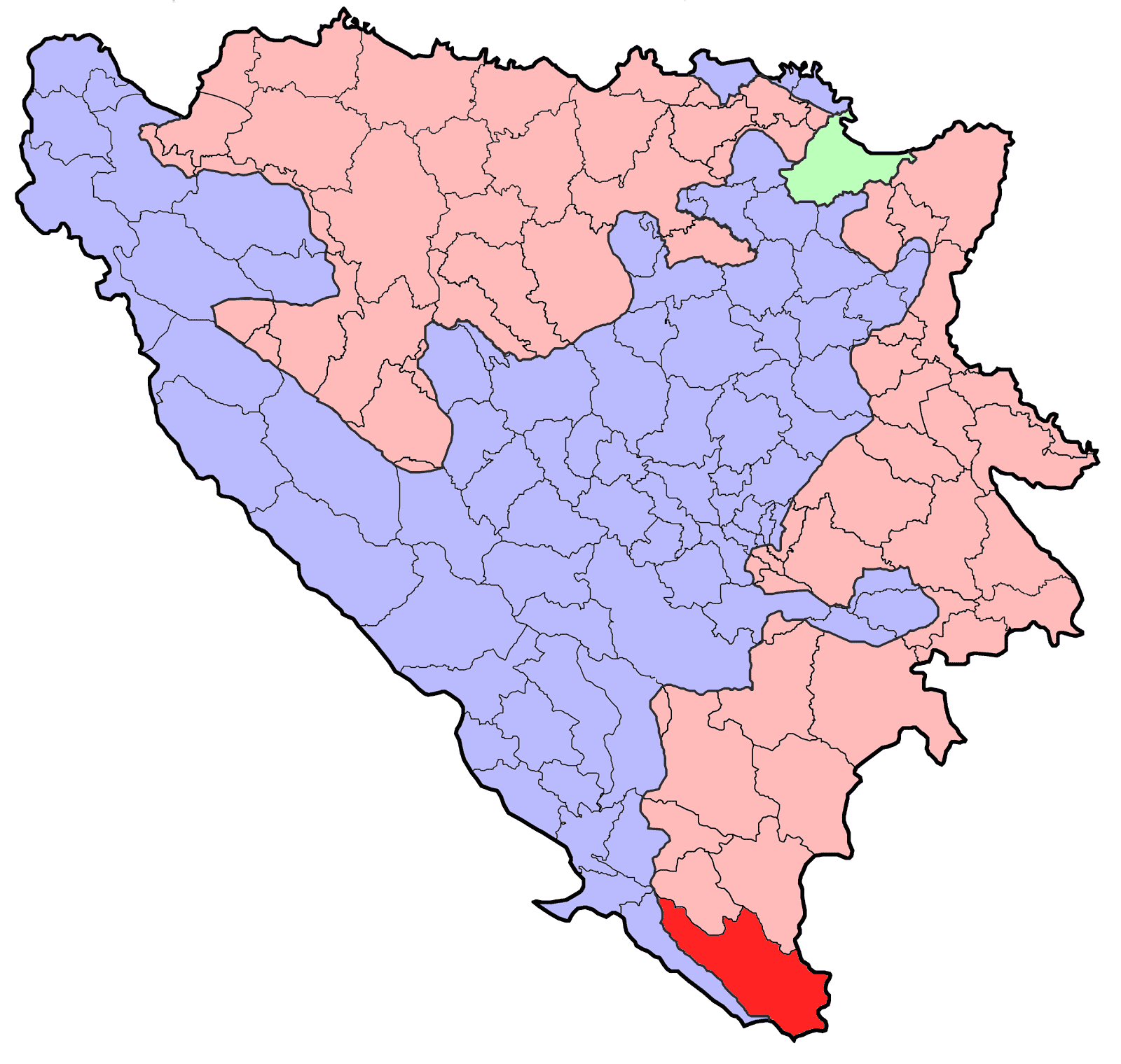 Republika Srpska (BiH) municipality